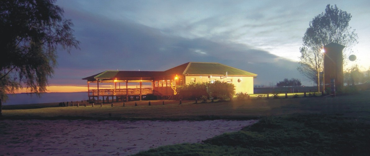 Restaurante en el Camino Costero del Parque Natural Laguna de Gómez, en Junín, Argentina. (Autor: Germán Ramos).